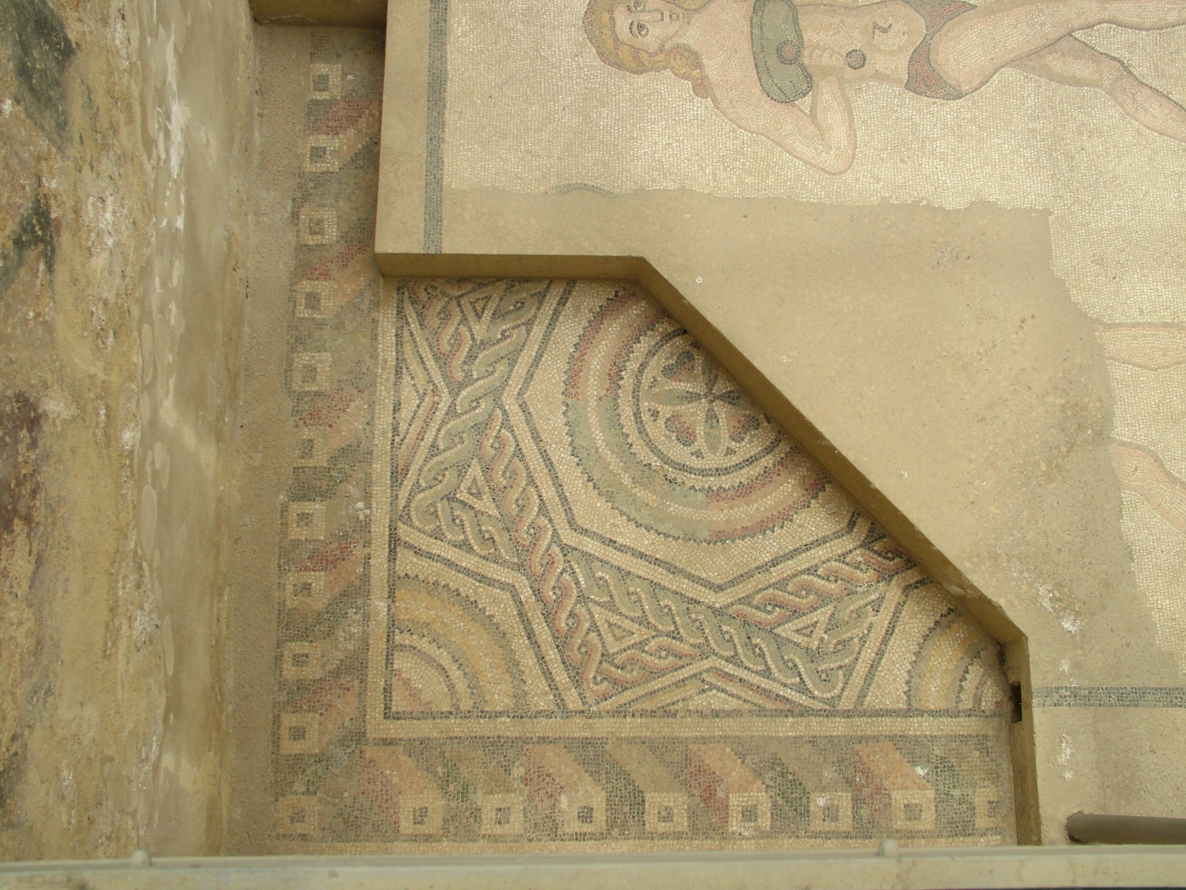 Piazza Amerina, Sizilien, Villa Romana del Casale, ein Mosaik unter den Bikini Mädchen